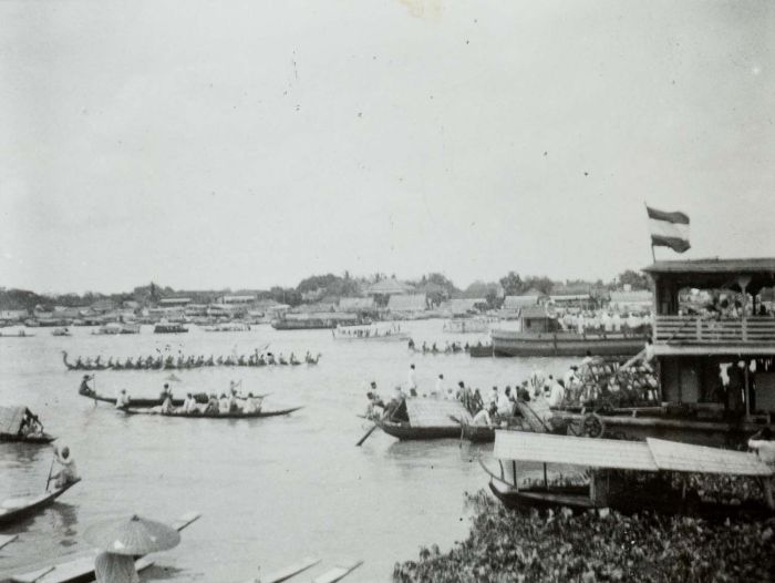 Foto. Roeiwedstrijden met prauwen in de rivier Musi op Koninginnedag, Palembang